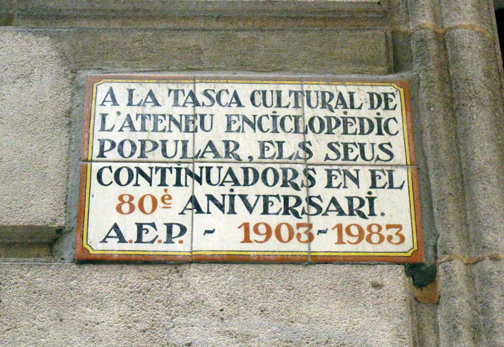 Ateneu Enciclopèdic Popular. C. Carme, 30 (Barcelona)